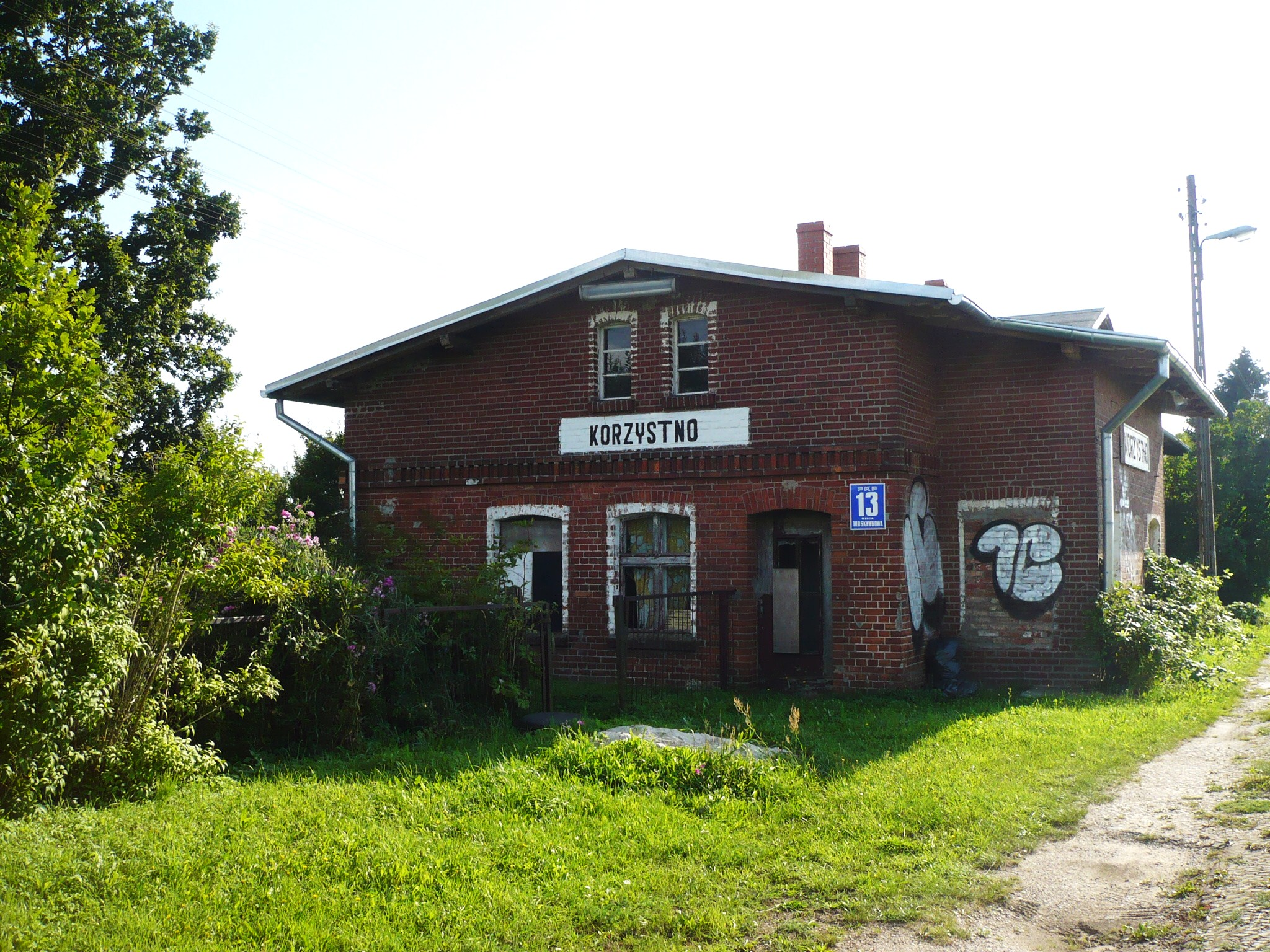 Korzystno, stacja kolejowa